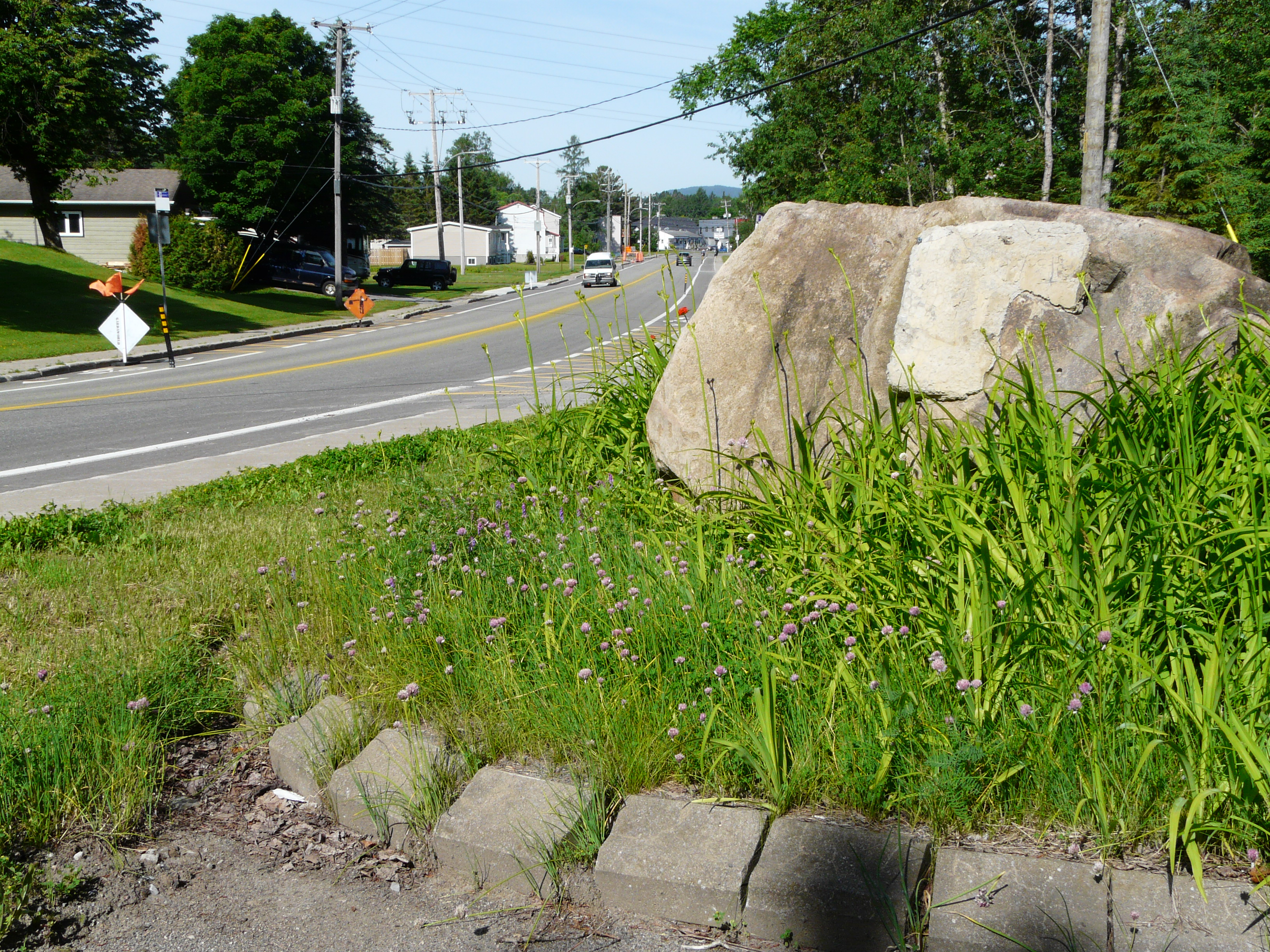 Rocher commémorant le lieu de fondation de Notre-Dame-des-Laurentides, nommé Rivière-Jaune.